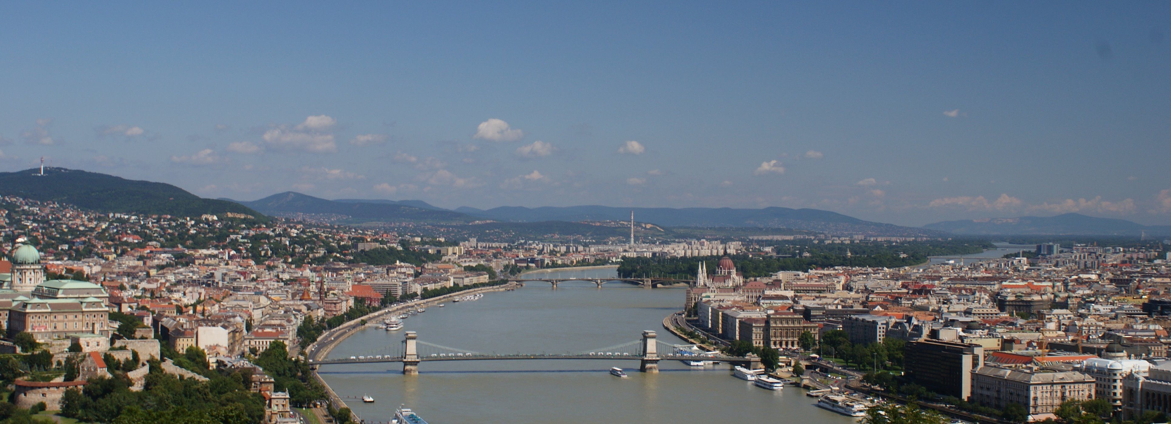 Panorama Budapesztu.